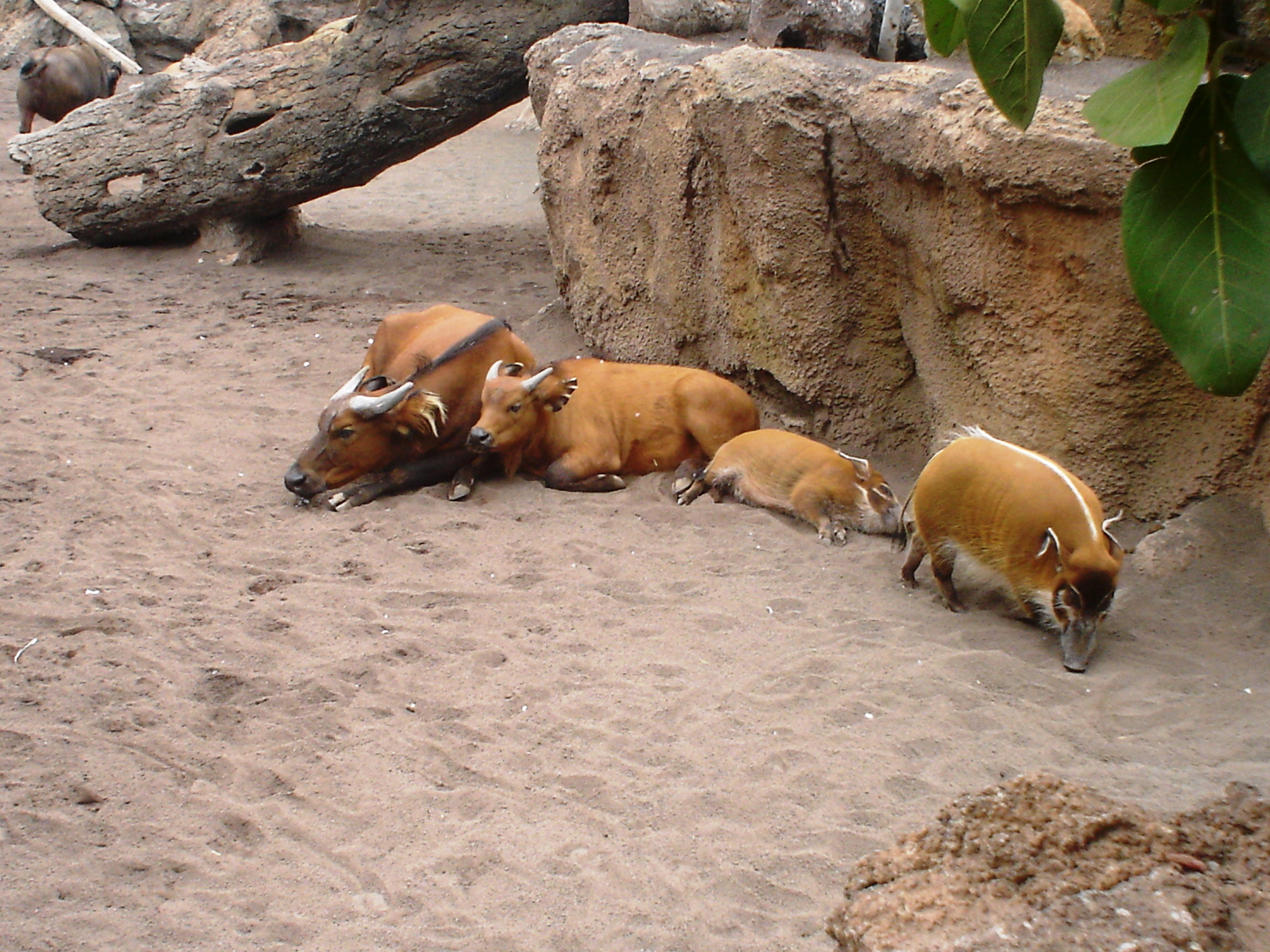 Potamochero